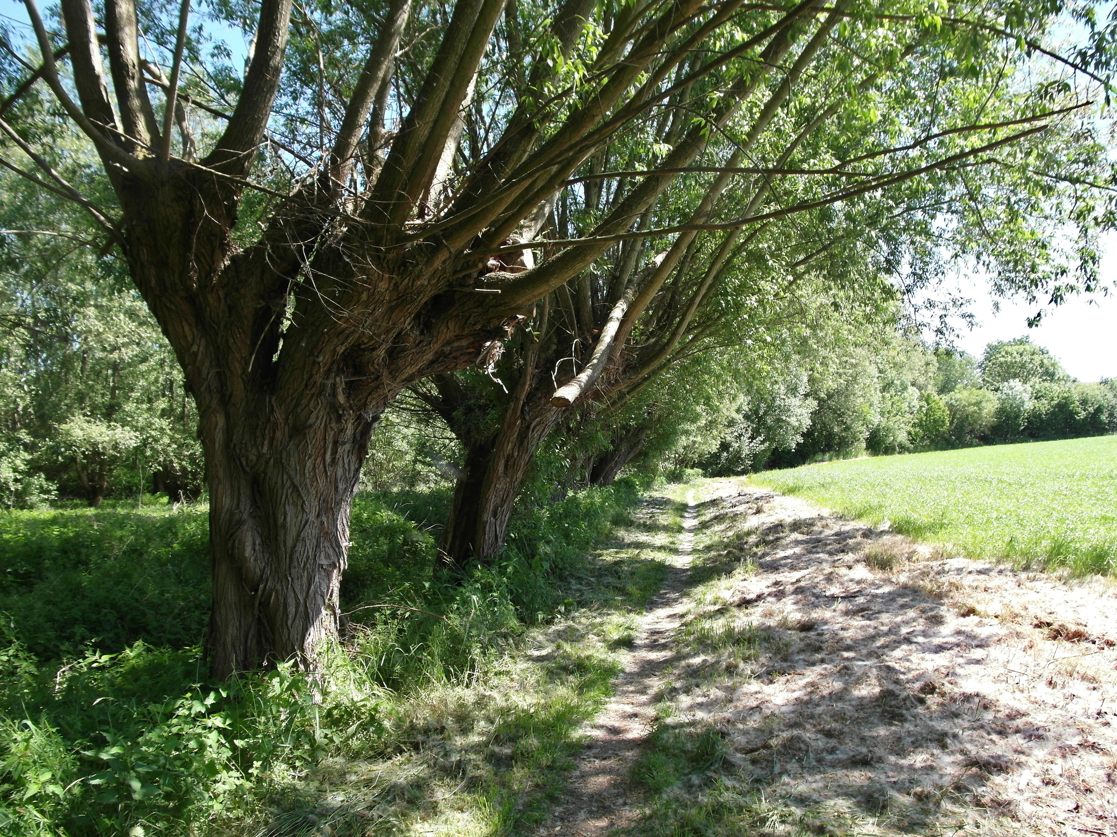 20.05.2018 01728 Hänichen / Rippien (Bannewitz): Alte Weidenbäume am Oberlauf des Gerberbaches im Bereich von GMP: 50.976537,13.728245. [SAM6270.JPG]20180520125DR.JPG(c)Blobelt